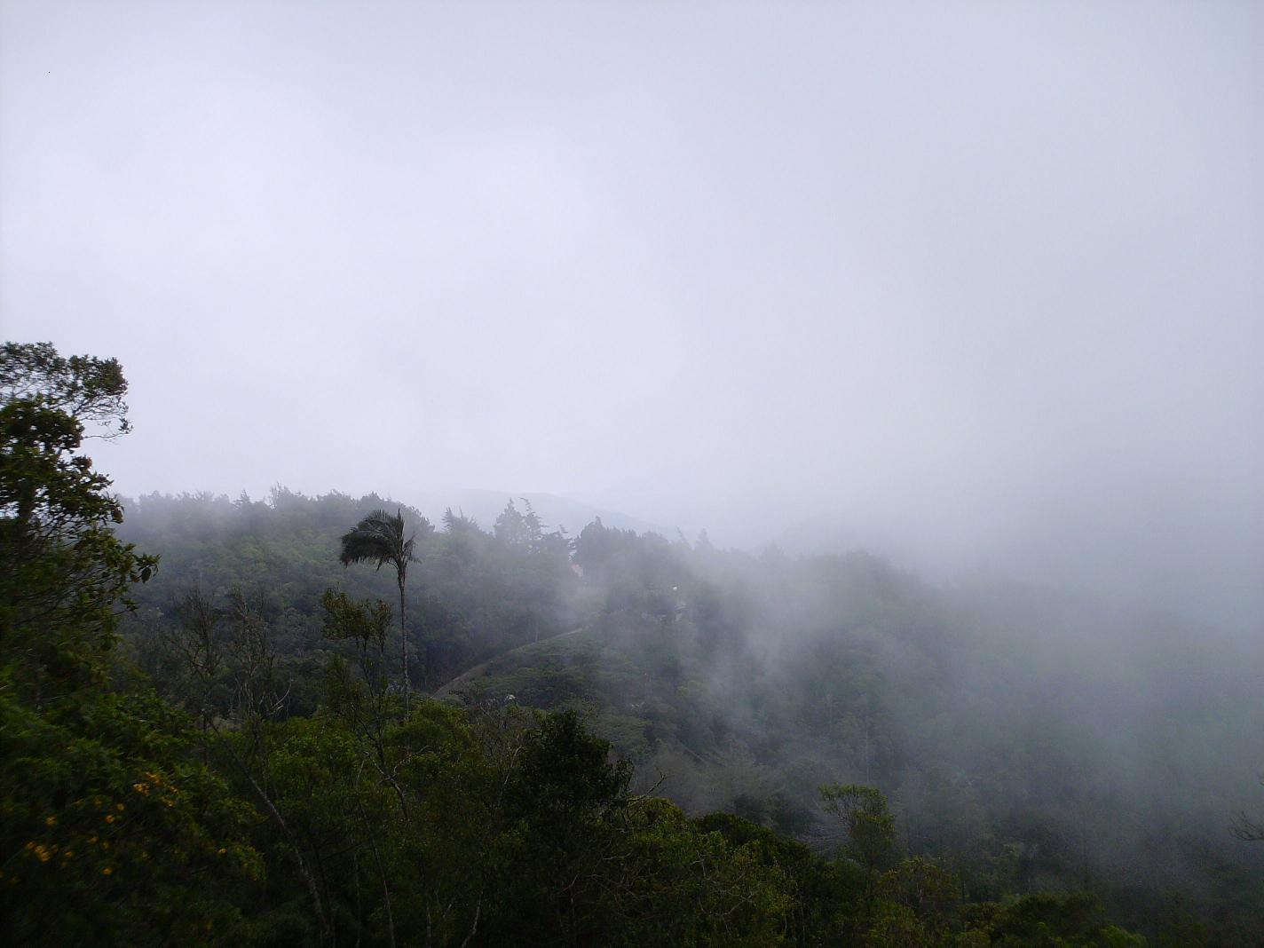 Selva nublada en la Colonia Tovar (Venezuela). Las nubes ascienden por las laderas durante el día (especialmente en la tarde) e impiden la excesiva irradiación durante la noche. En esta zona, la selva original está bastante intervenida